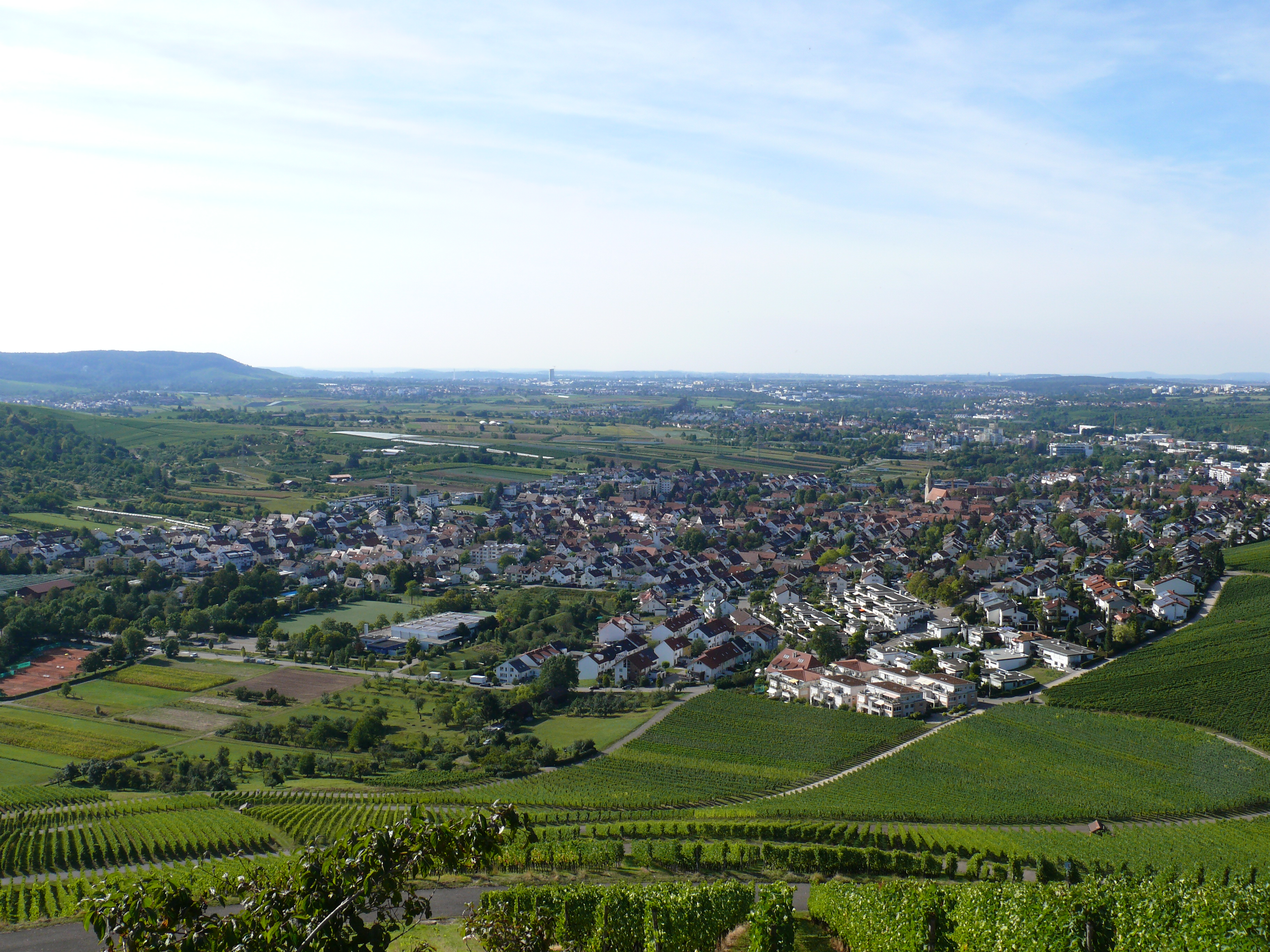 Blick auf Weinstadt-Beutelsbach aus östlicher Richtung von den Drei Riesen.